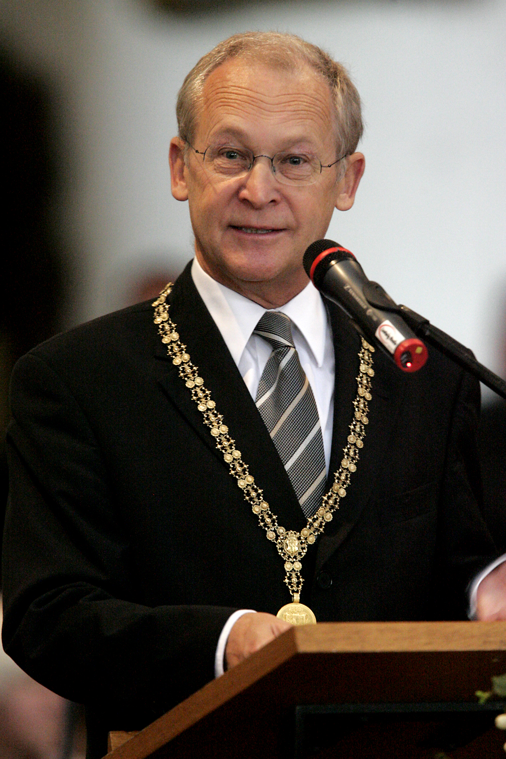 Dr. Ivo Holzinger, Oberbürgermeister der Stadt Memmingen während der Preisverleihung des Memminger Freiheitspreises 1525 an Gyula Horn in der St. Martinskirche